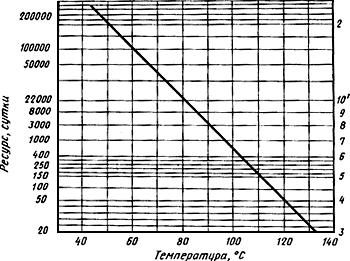 ГОСТ 7866.3-76 График зависимости между сроком службы и температурой судового кабеля